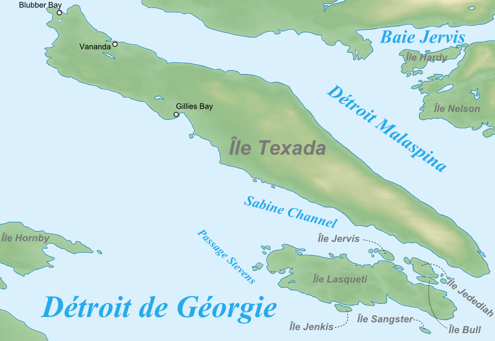 Sujet : Carte de l'île Texada en Colombie-Britannique au Canada. Origine des données : Altitudes : site FTP du SRTM (Shuttle Radar Topography Mission) de la NASA. Contour des rivages et des étendues d'eau : site FTP de SWBD (SRTM Water Body Dataset) du SRTM (Shuttle Radar Topography Mission) de la NASA. Visualisation des données : Altitudes : logiciel 3DEM de Visualization Software LLC. Contour des rivages et des étendues d'eau : logiciel dlgv32 Pro (version allégée de Global Mapper 9) de l'USGS. Projection : Données brutes non transformées. Logiciels de dessin : . Inkspace Format : PNG Méthode : Carte réalisée en s'inspirant des didactitiels de Sting.